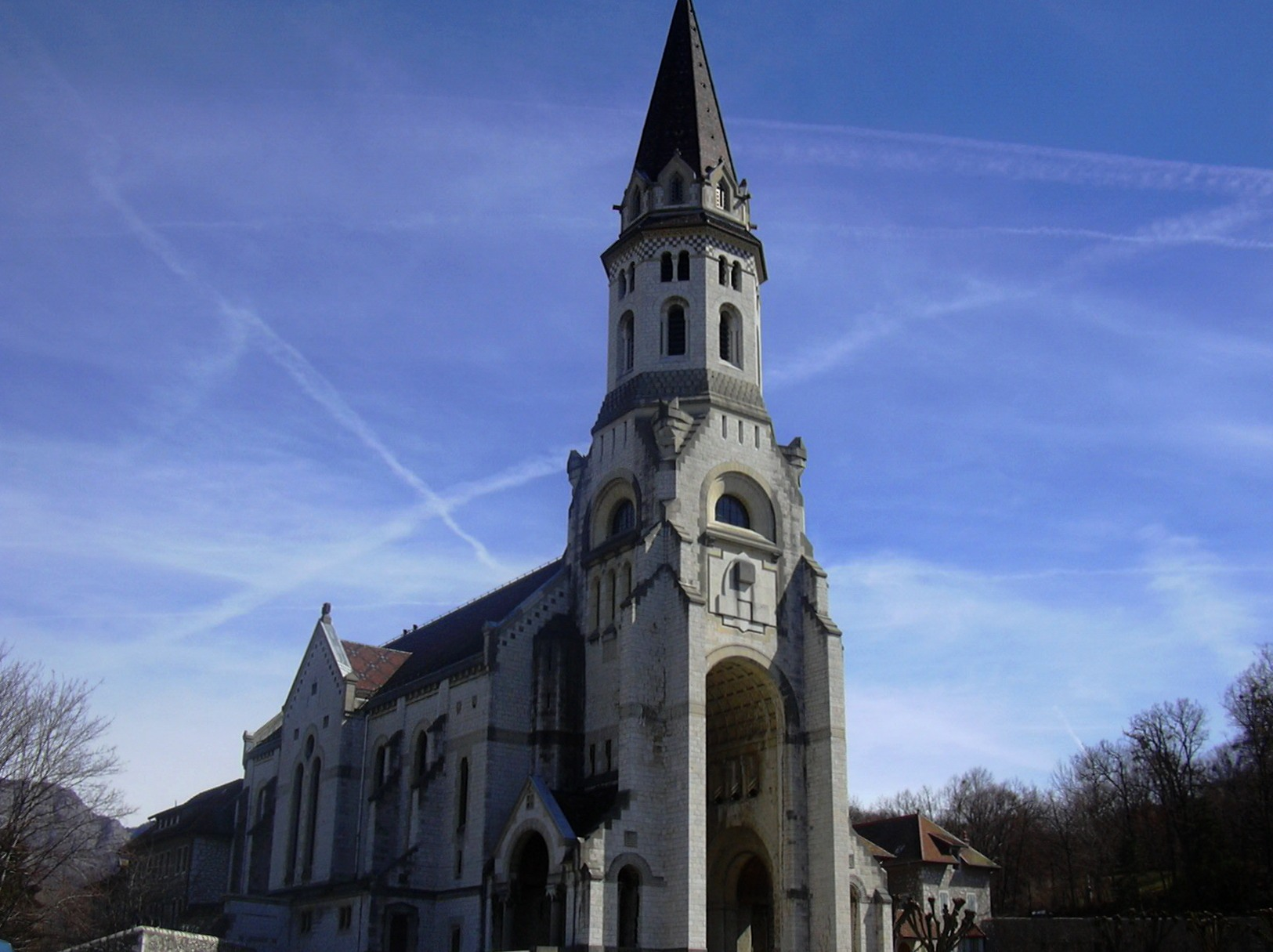 La Basilique de la Visitation à Annecy Photo prise par Sam en mars 2006